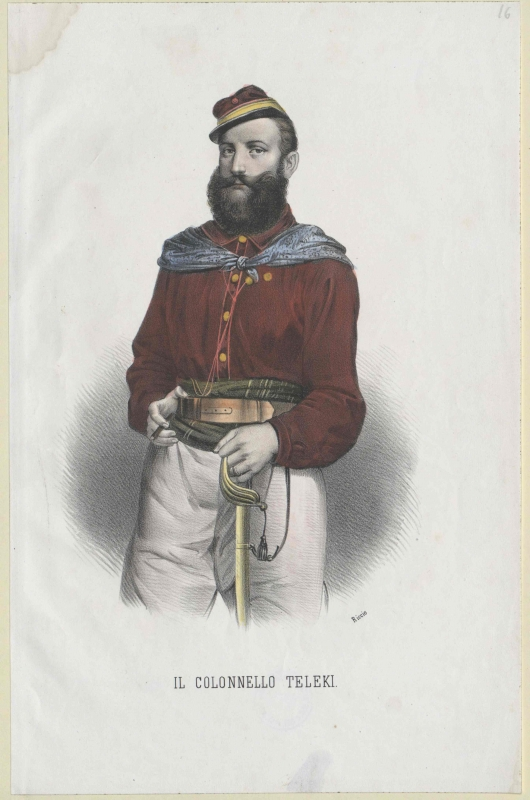 Teleki, Alexander Graf (1821 - 1892)